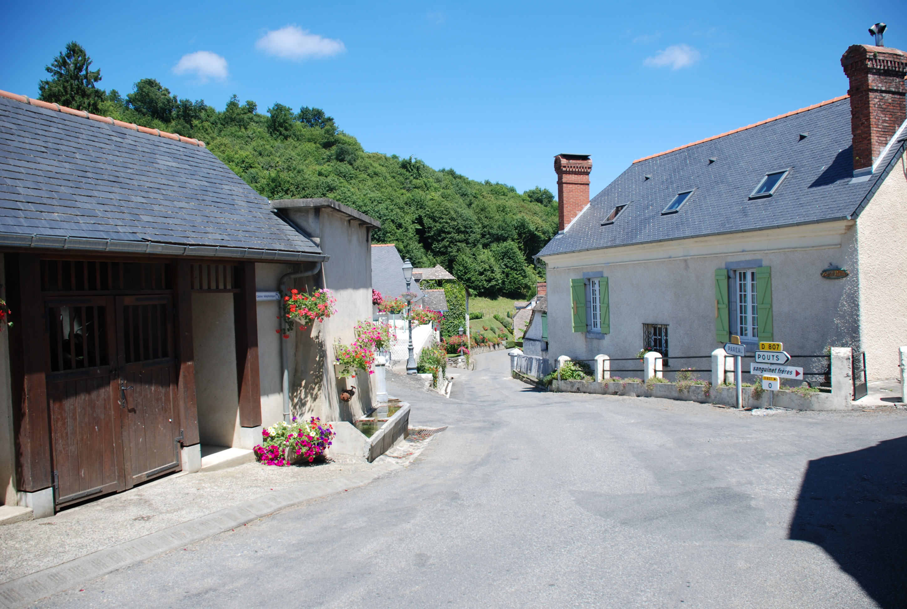 Photographie du centre de Bourréac en descente vers Paréac. La comparaison avec la photo ci jointe prise durant l'hiver 1940 met en évidence un bassin de stockage érigé lors de la connexion des foyers à l'eau potable amenée en pente naturelle, sans pompage, au centre du village depuis la source Bidole. Jusqu'alors on venait chercher son eau à la fontaine. Actuellement la distribution d'eau se fait à partir d'une autre source plus abondante, située à Coulat, au bas du village, alimentant un réseau d'AEP par pompage. On notera les anciens abreuvoirs et la fontaine en pierre de Lourdes. L'ancienne maison de Lahaille visible sur la photo de 1940 a disparu. A droite la maison Pouzadé.